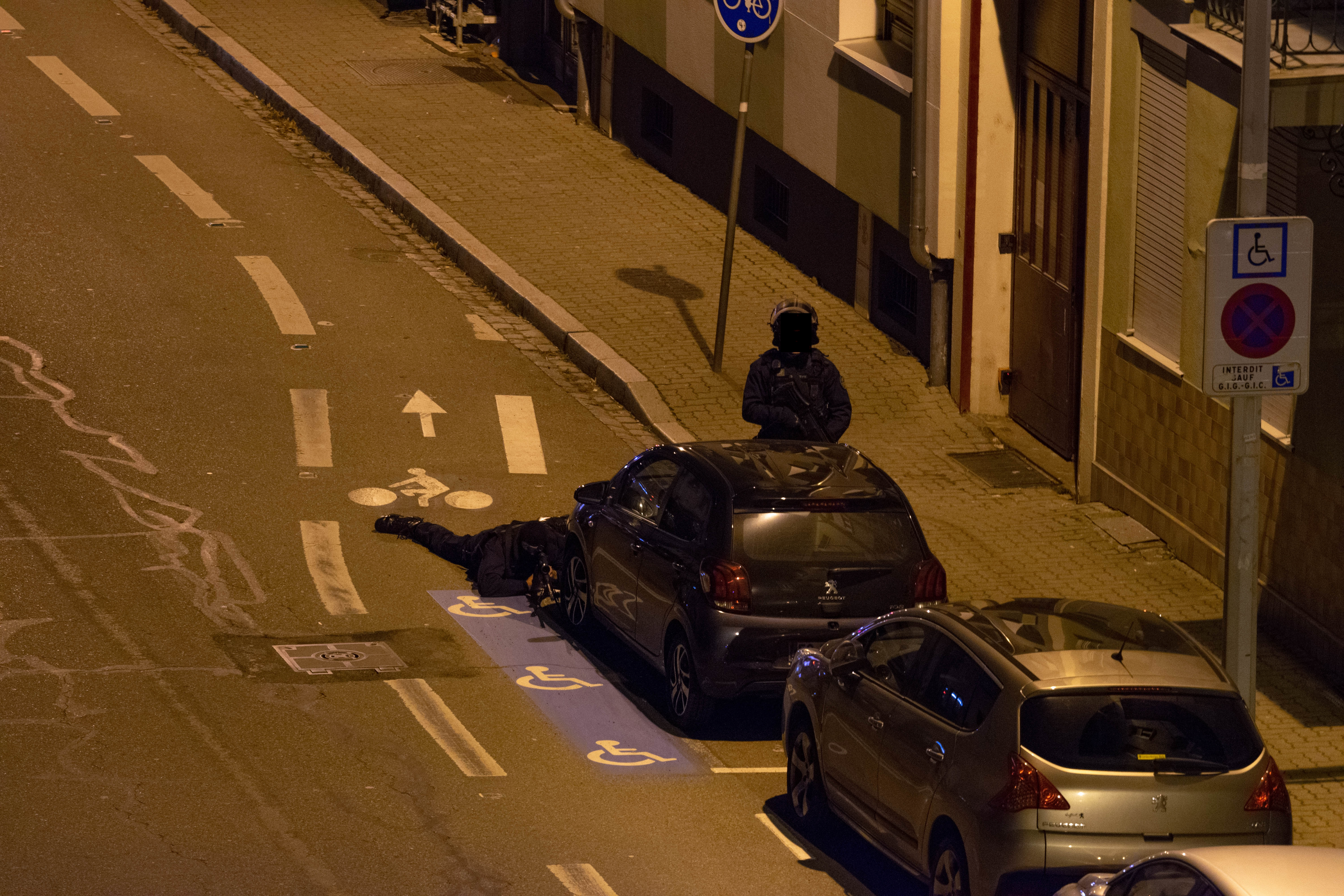 Intervention des services de police le soir de l'attentat à Strasbourg, 11 décembre 2018, route de l'hôpital.